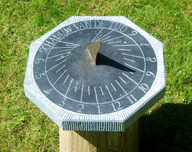 horizontale zonnewijzer, door mij ontworpen, eigen foto